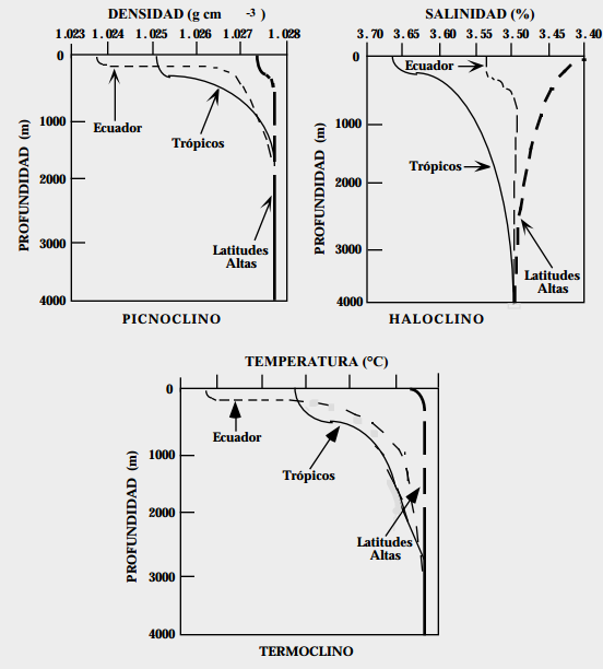 termoclino, picnoclino, haloclino